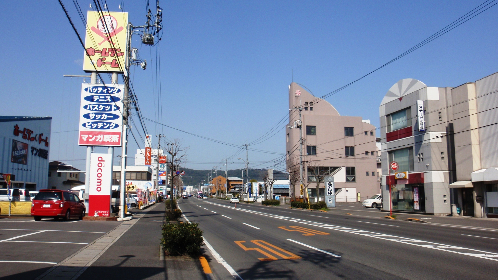 香川県高松市の市道花ノ宮木太線の風景。終点の松縄町・木太町境付近から望む。左の黄色い看板「ホームランドーム」より奥（西側）が当市道で、手前（東側）は県道10号高松長尾大内線別線。